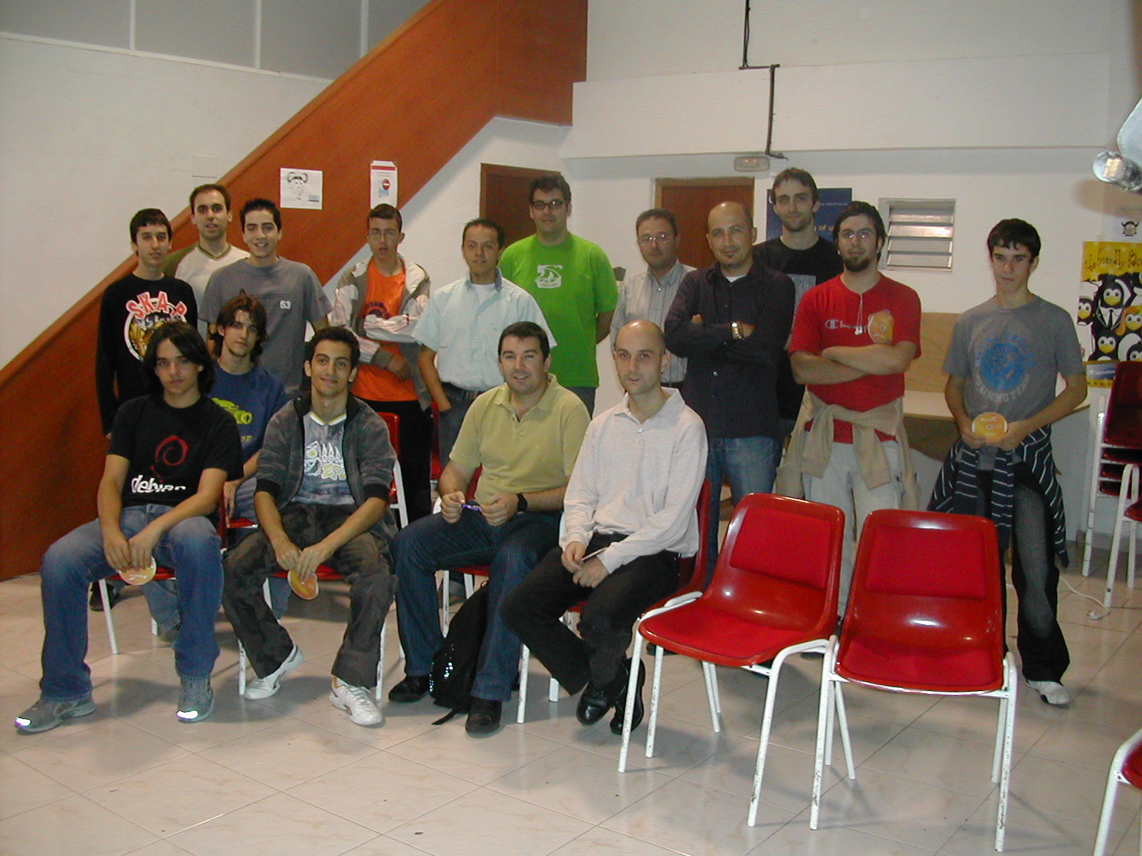 Foto dels asistents a la install party de mandriva 2007 celebrada a la casa jove de Meliana el dia 21 de octubre de 2006. Organitzada per Hortanet.